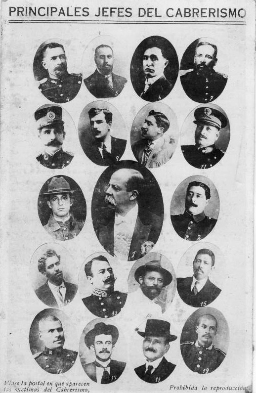 Afiche del presidente Estrada Cabrera y sus colaboradores, luego de su derrocamiento en 1920.